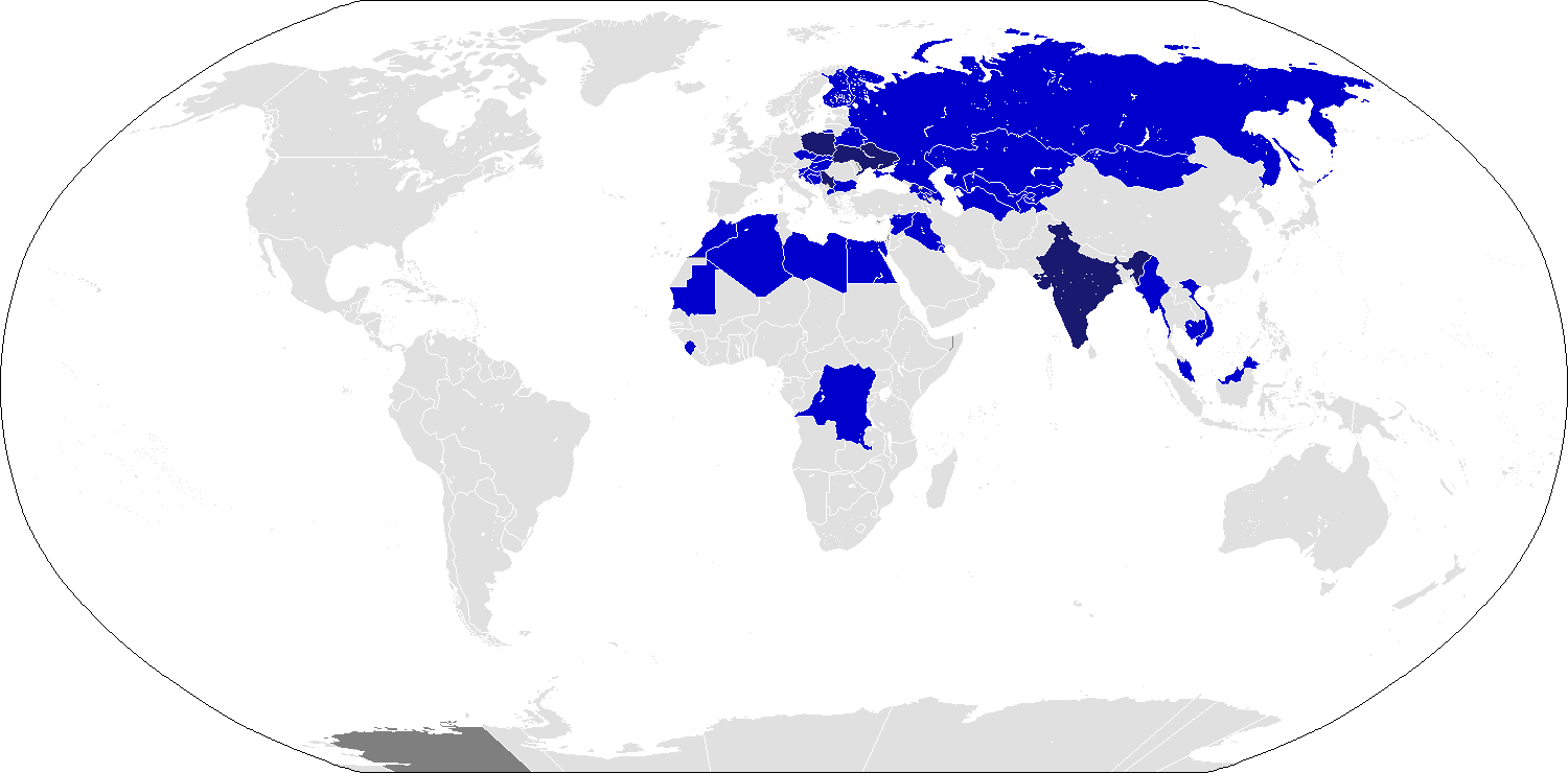 русский (ru): Пользователи НСВ Производители НСВ. Пользователи НСВ.